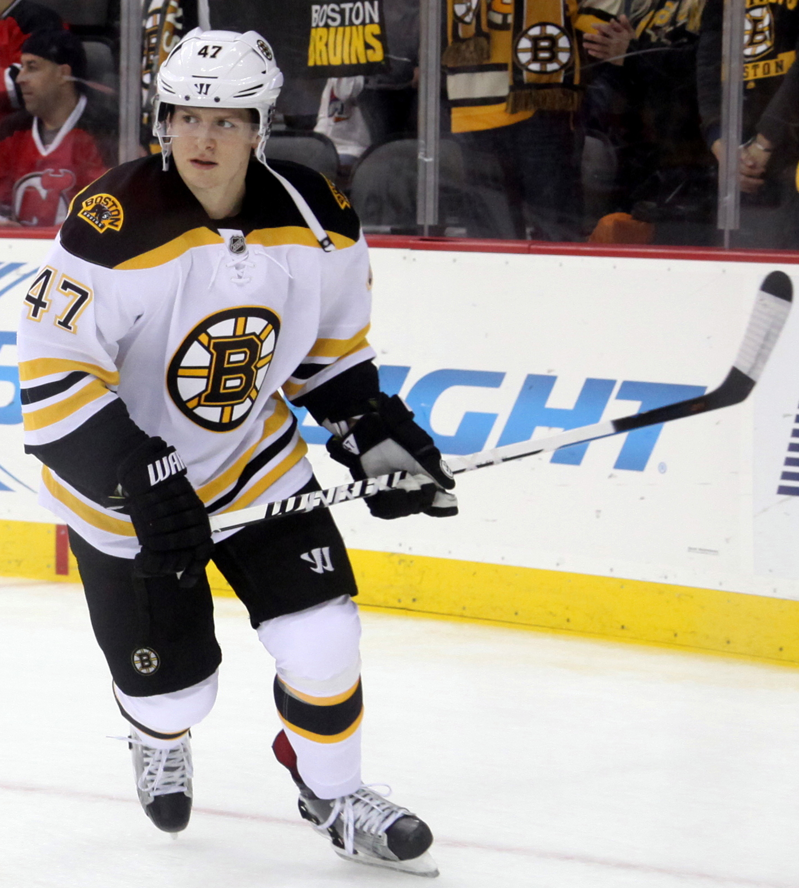 Krug in January 2016.